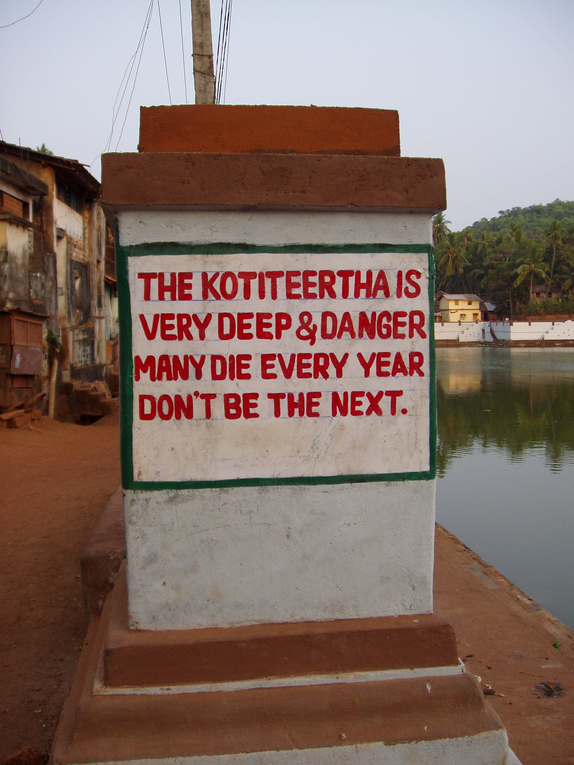 India Karnataka Gokarna Kotiteertha